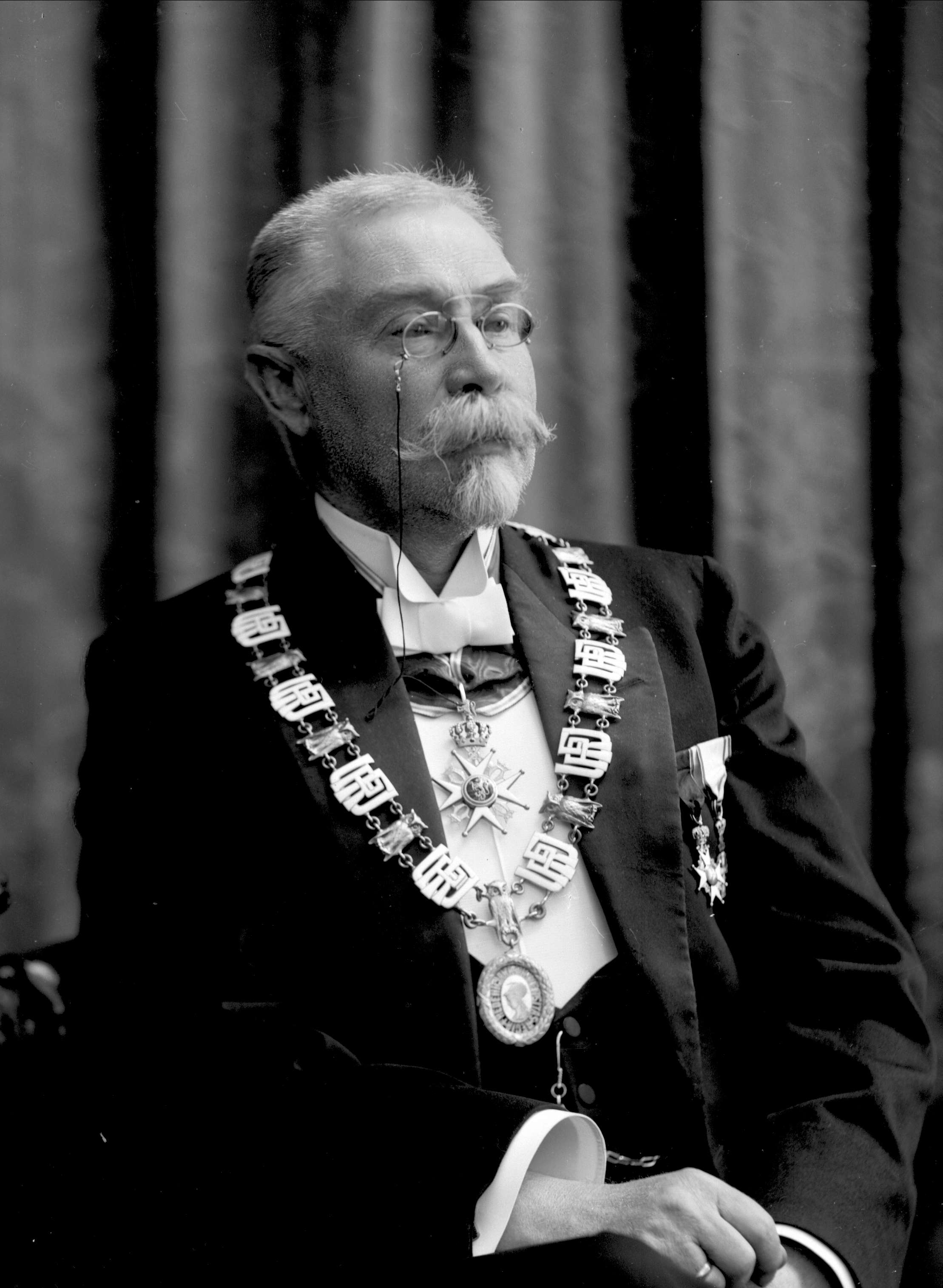 Rektor ved Universitetet i Oslo Bredo Henrik von Munthe af Morgenstierne, 1913